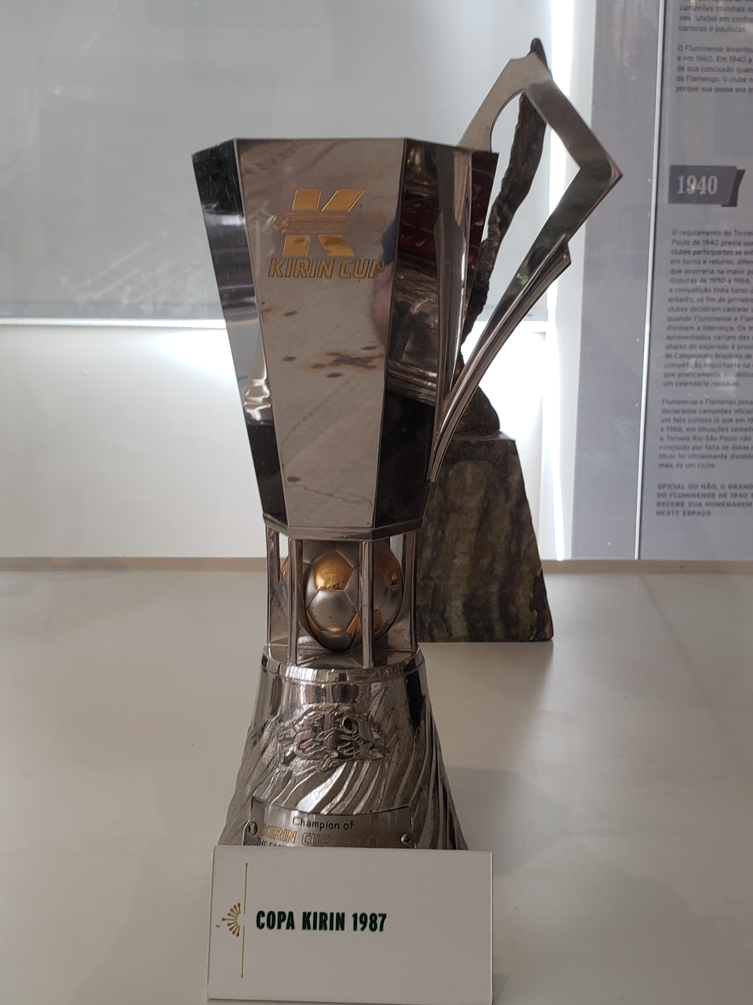 Copa de futebol disputada no Japão em 1987, que teve como vencedor o Fluminense Football Club.